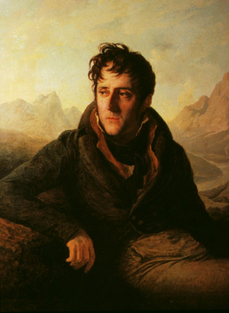 Paulin Guérin ((1783–1855), Portrait de François-René de Chateaubriand collection privée